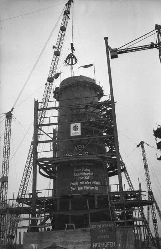 Eisenhüttenkombinat-Ost, Hochofen I ADN-ZB/Sturm, 10.4.1951 Aufbau des Eisenhüttenkombinats Ost Am 10.4.1951, 10 Tage vor dem Plantermin, konnten die Werktätigen des Schwerpunktbetriebes Eisenhüttenkombinat Ost, die Richtkrone am Hochofen I anbringen.